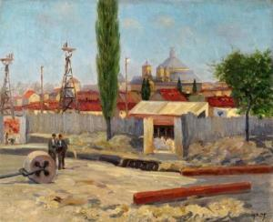 Arthur Mendel - Peisaj din Bucuresti.